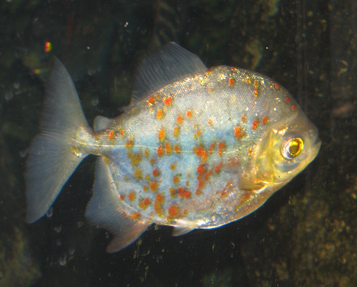 Male Redhook Metunnis - Myleus rubripinnis (Syn. Myloplus rubripinnis)